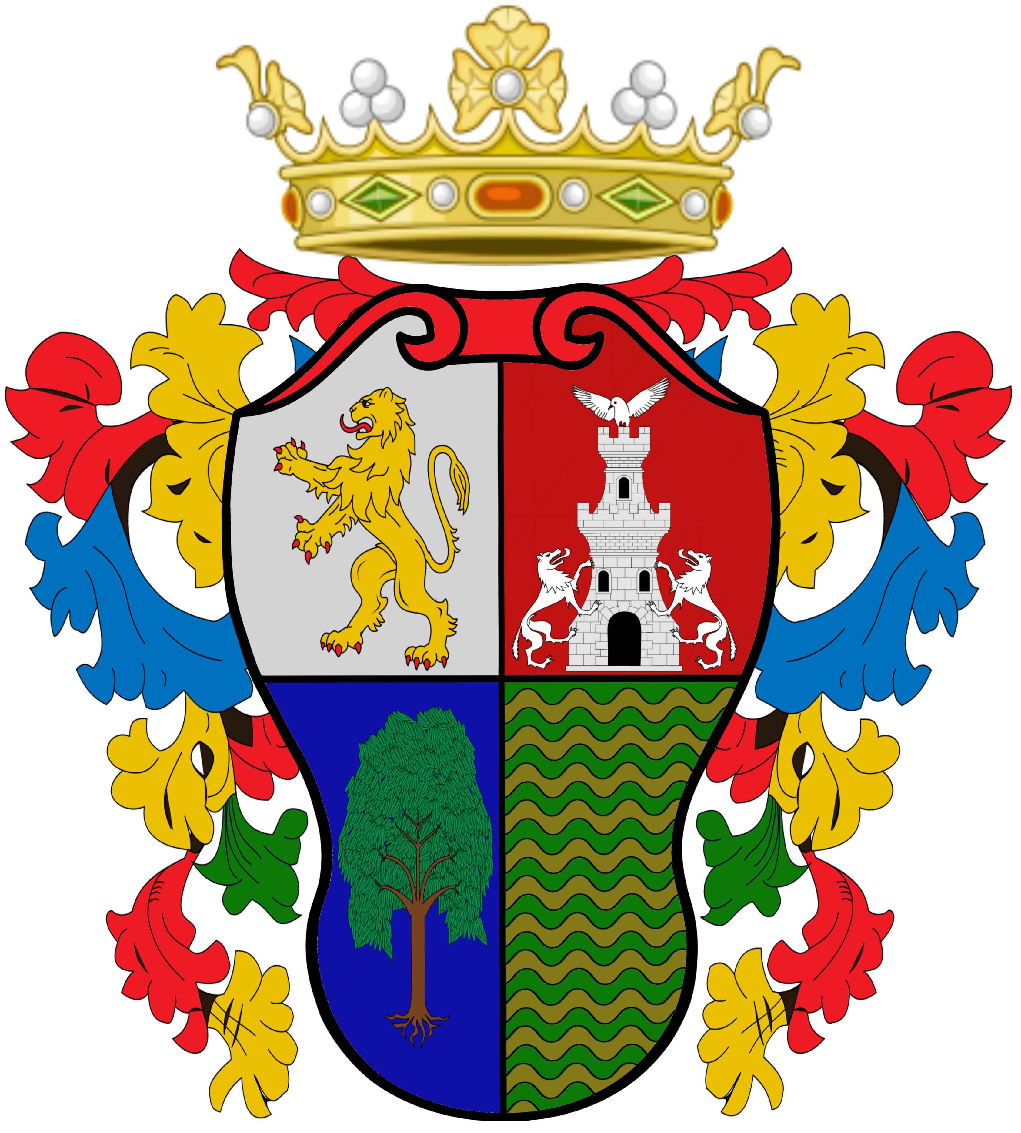 Escudo de armas otorgado por Carlos II a don Antonio Sánchez de Orellana y Ramírez de Arellano, creado I marqués de Solanda según cédula real del 27 de abril de 1700.